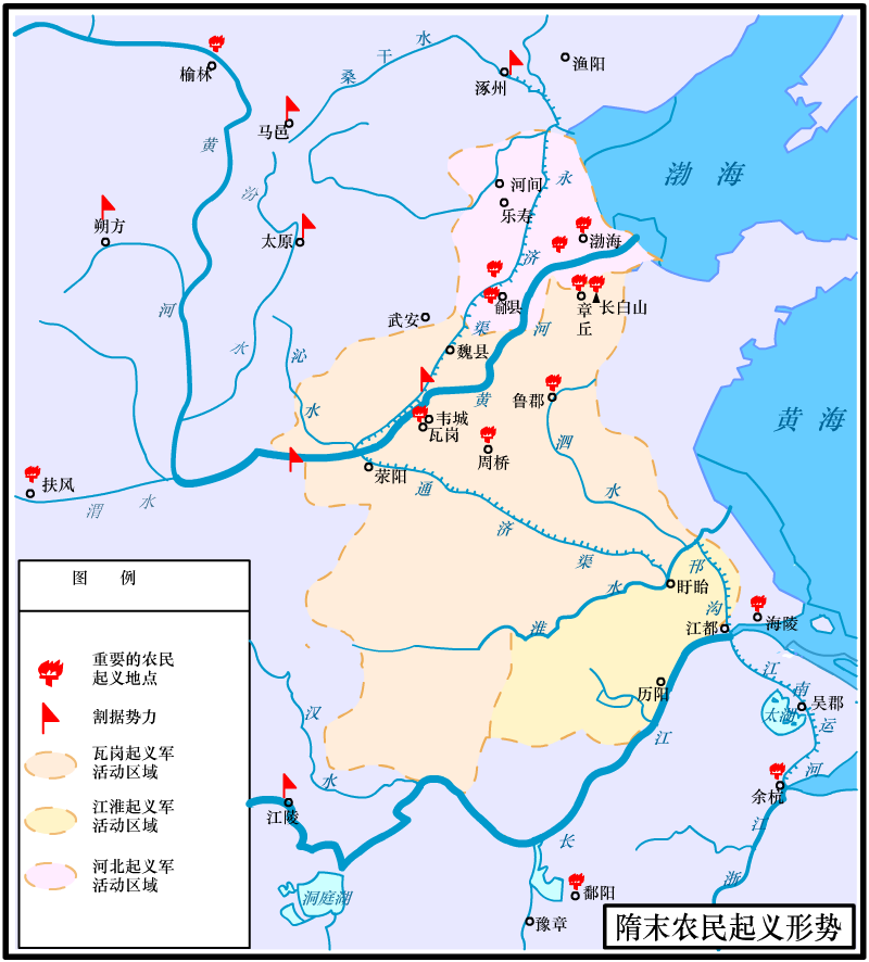 隋末农民起义形势。绘制人:竹围墙